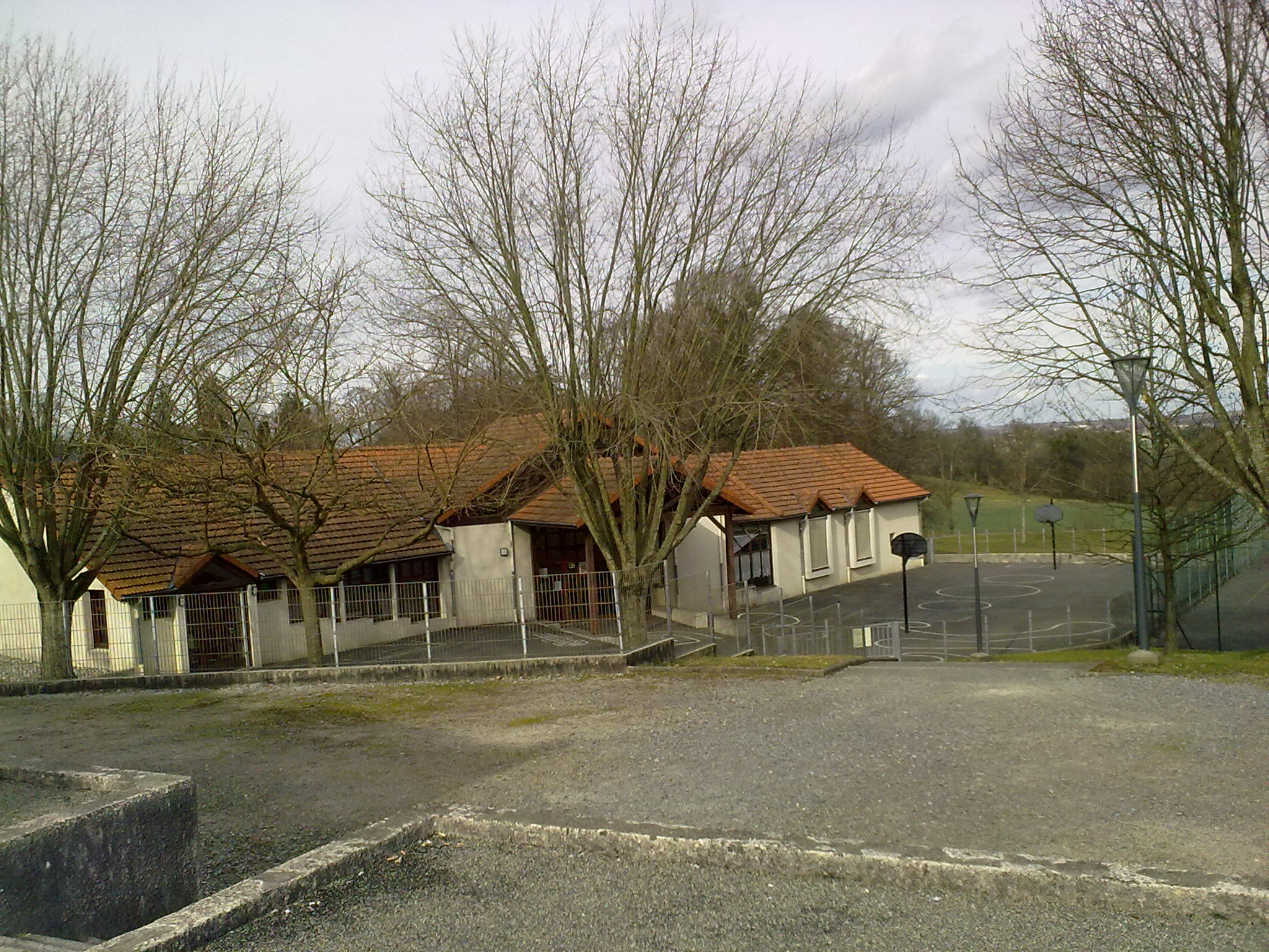 Ecole de Bernadets